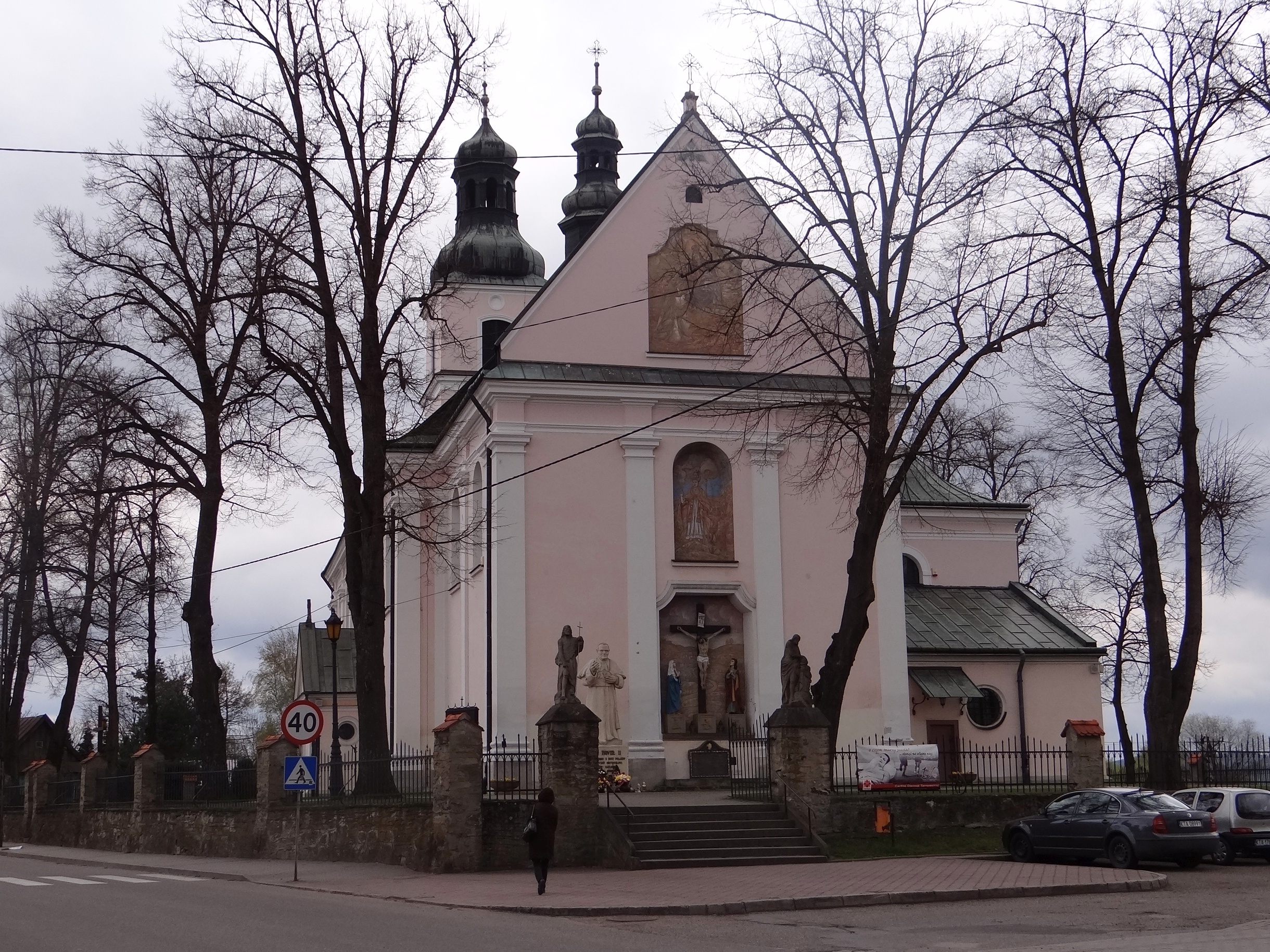 Zakliczyn - kościół św. Idziego Opata, 1739-1768